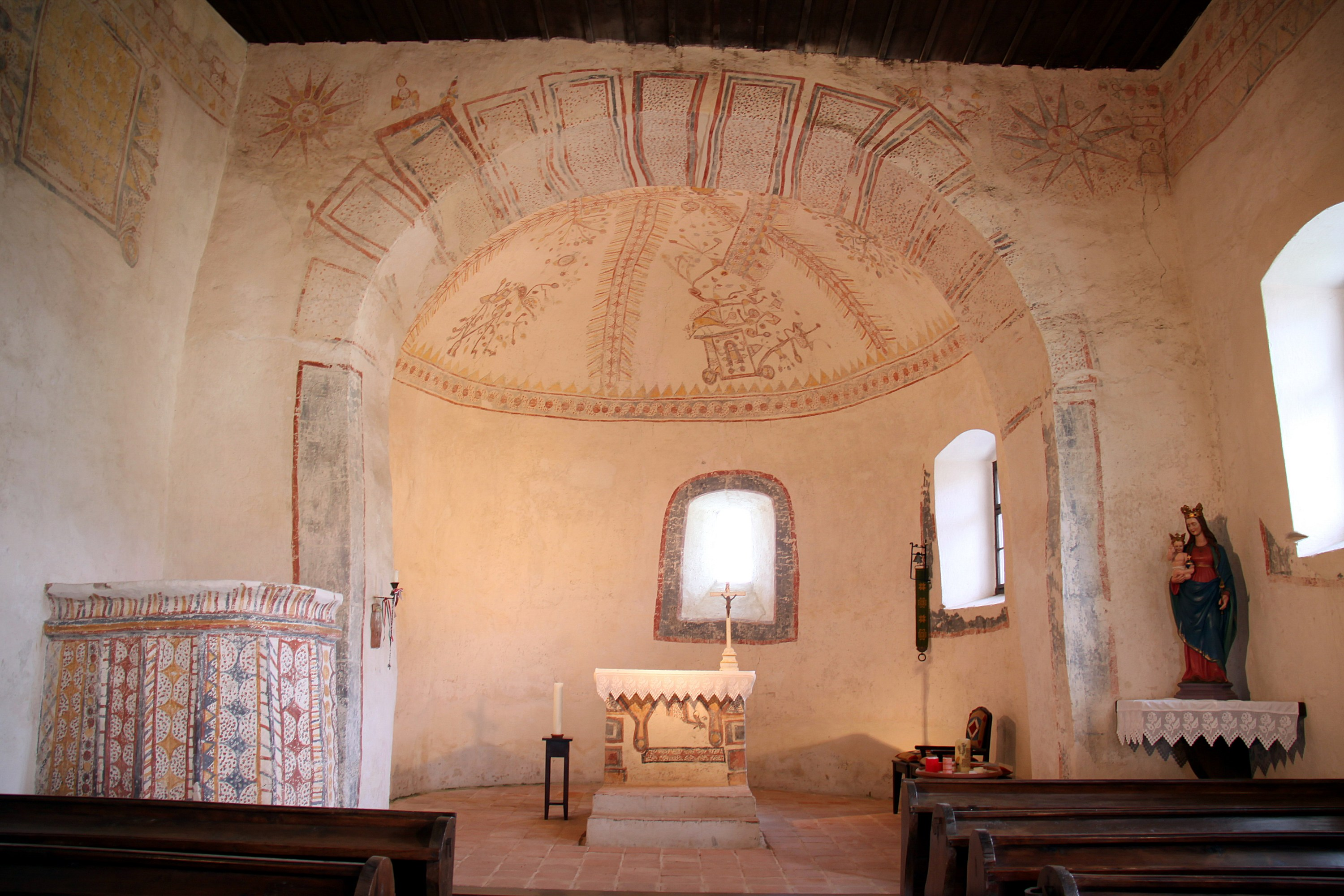 Denkmalgeschützte römisch-katholische Filialkirche in Siget in der Wart, Gemeinde Rotenturm an der Pinka